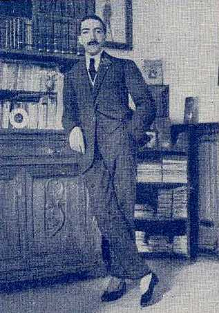 Ramón Fernández Mato, fotografía en Vida Gallega 1915